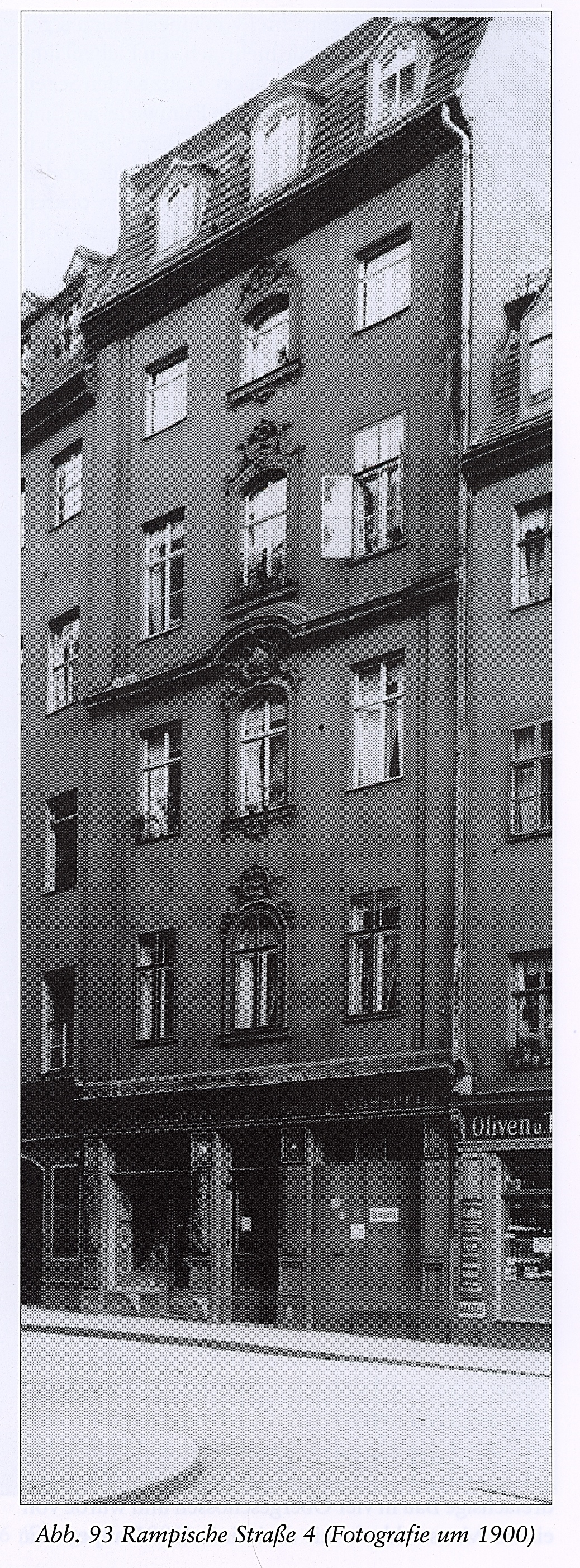 Dresden, Rampische Straße 4, Fotografie um 1900